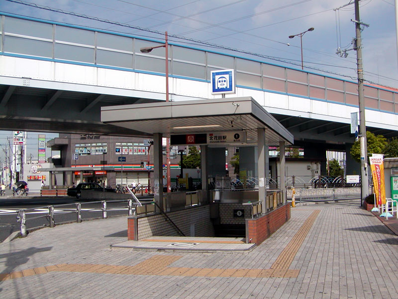 大阪市営地下鉄御堂筋線 北花田駅 1号出入口（写真正面）。ときはま線（写真奥の道路）を挟んだ後方には2号出入口。